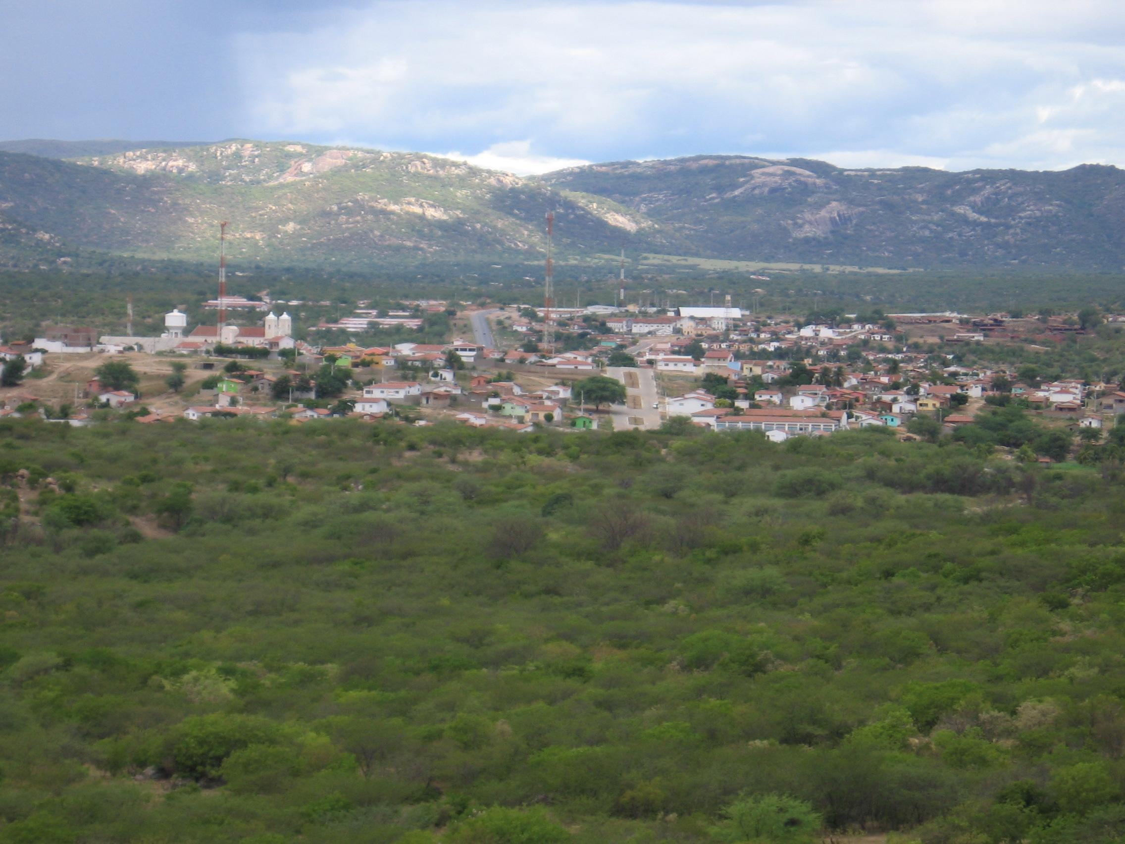 Acari, Rio Grande do Norte, Brasil.